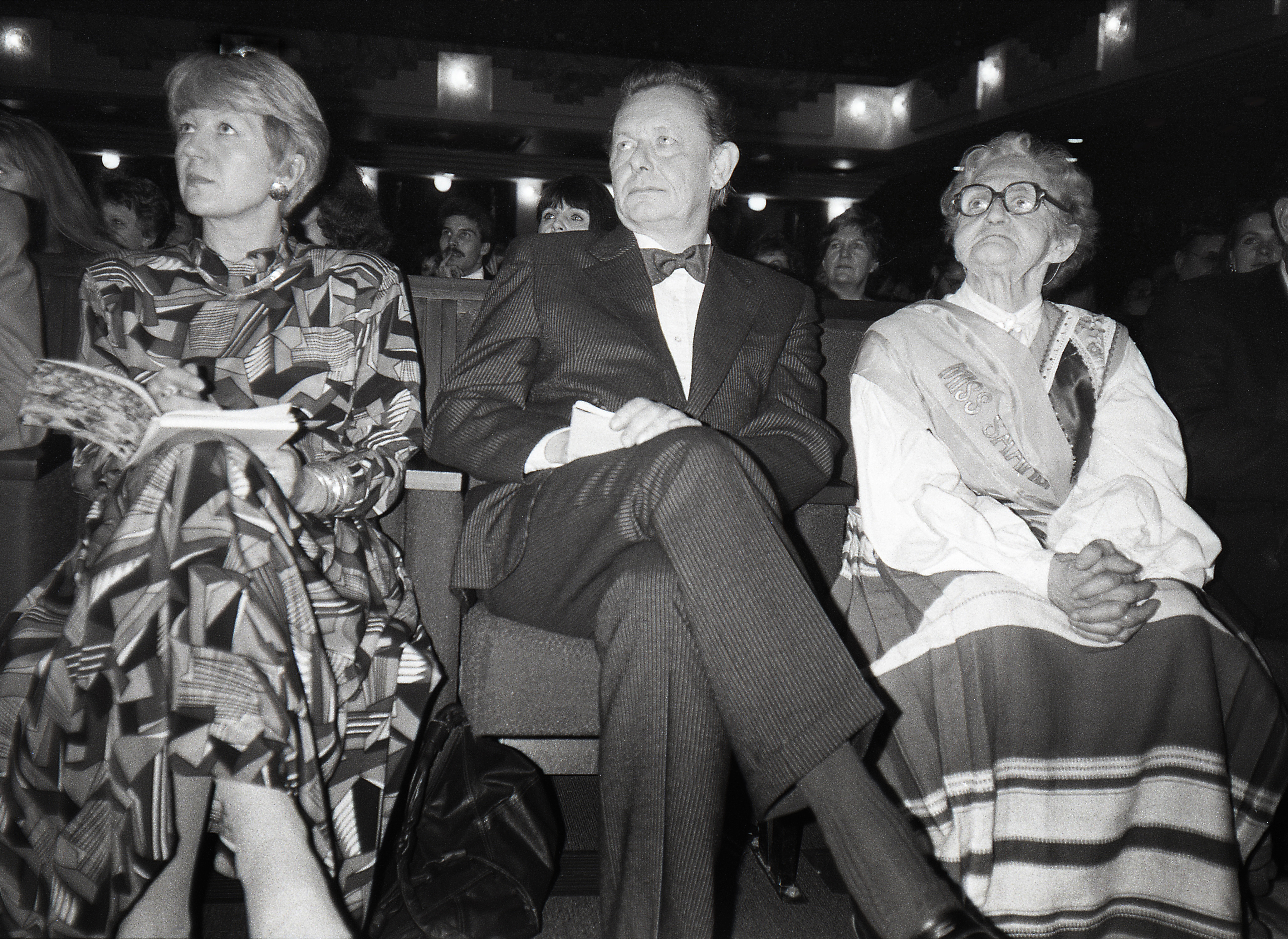 Krista Kajandu, Enn Vetemaa, Ljubov Hermann